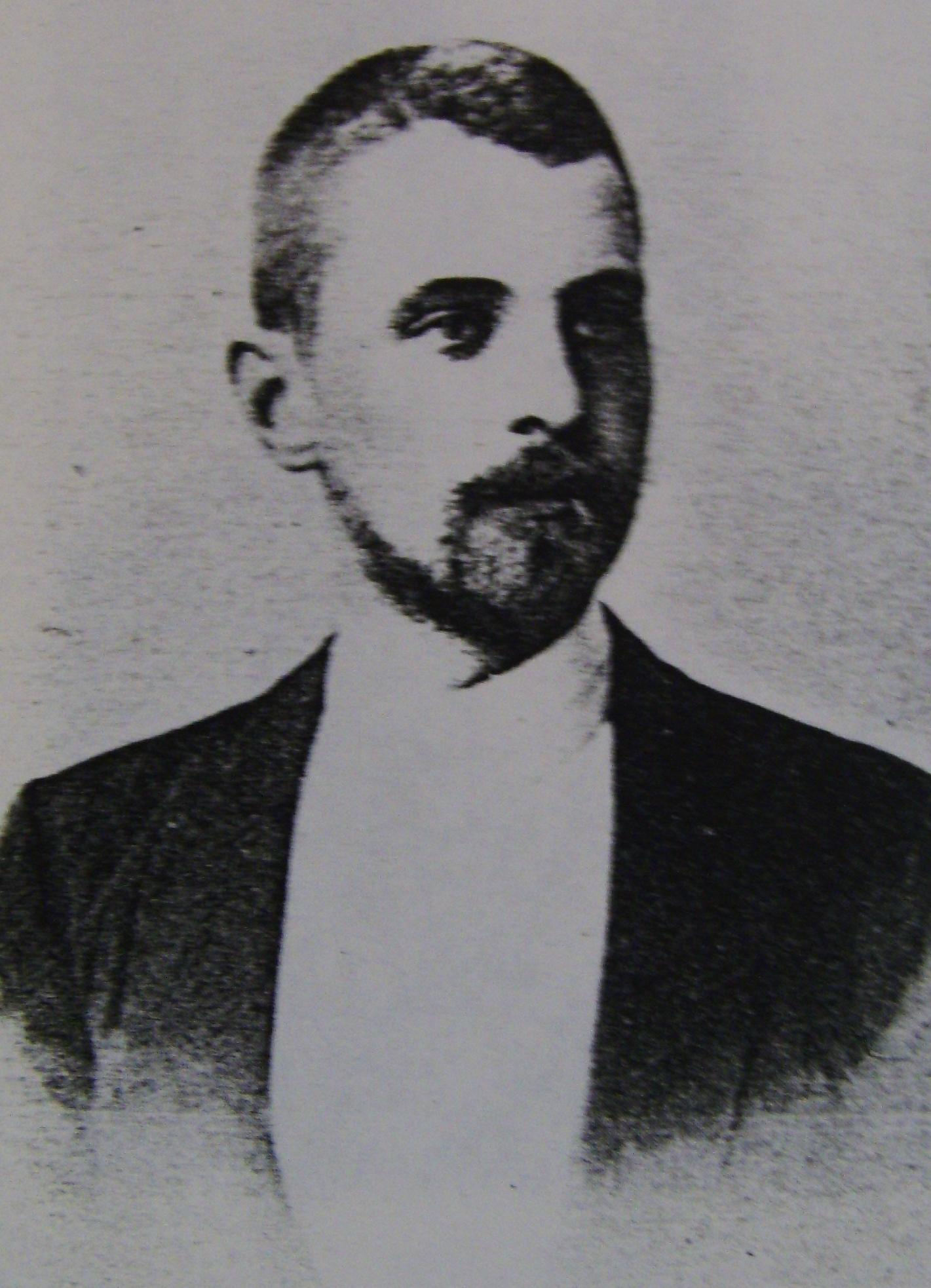 Sten Erik Algot Kjellgren, född 1872, disponent 1901-1921 vid Reijmyre glasbruk, Östergötland.